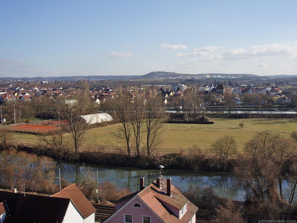 Blick von den Weinbergen in Heilbronn-Klingenberg über den Neckar-Alarm und den Neckar-Kanal nach Heilbronn-Horkheim In der Bildmitte die historische Ortsmitte mit Kirchturm und Steinhaus der Burg Horkheim, links die nach Nordosten gelegenen Neubaugebiete des 20. Jahrhunderts.